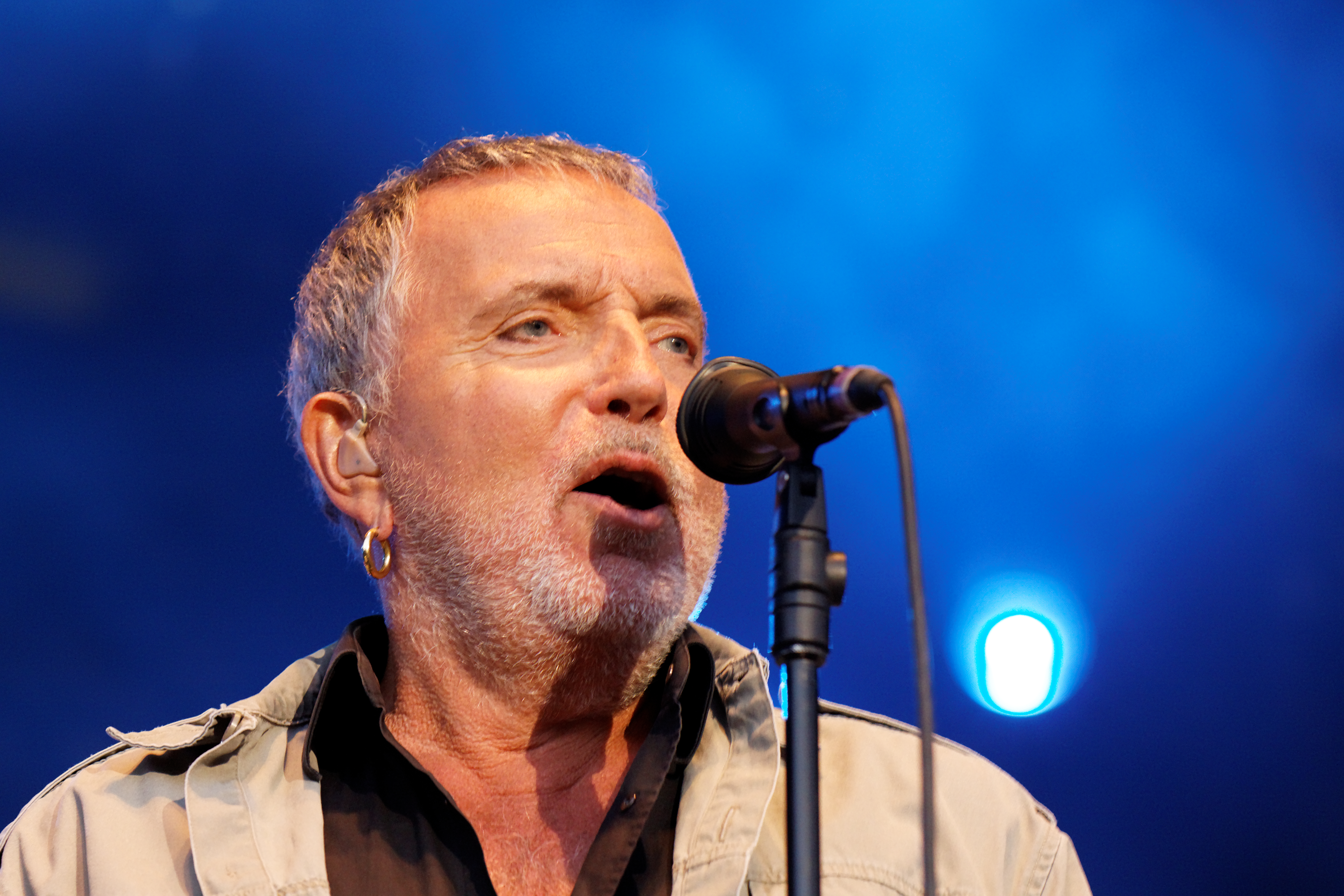 Bernard Lavilliers en concert sur la scène Landaoudec lors du festival du bout du Monde à Crozon dans le Finistère (France).